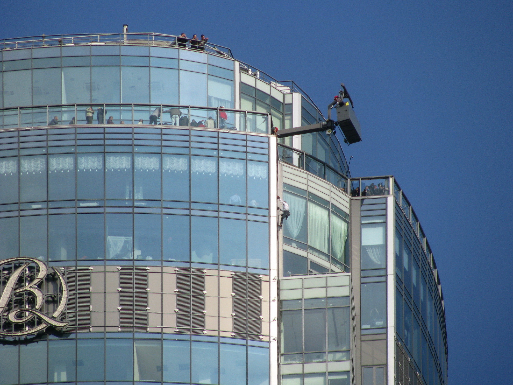 Ален Робер совершает восхождение на небоскрёб Высоцкий (188,3м) в Екатеринбурге, 24 сентября 2014г